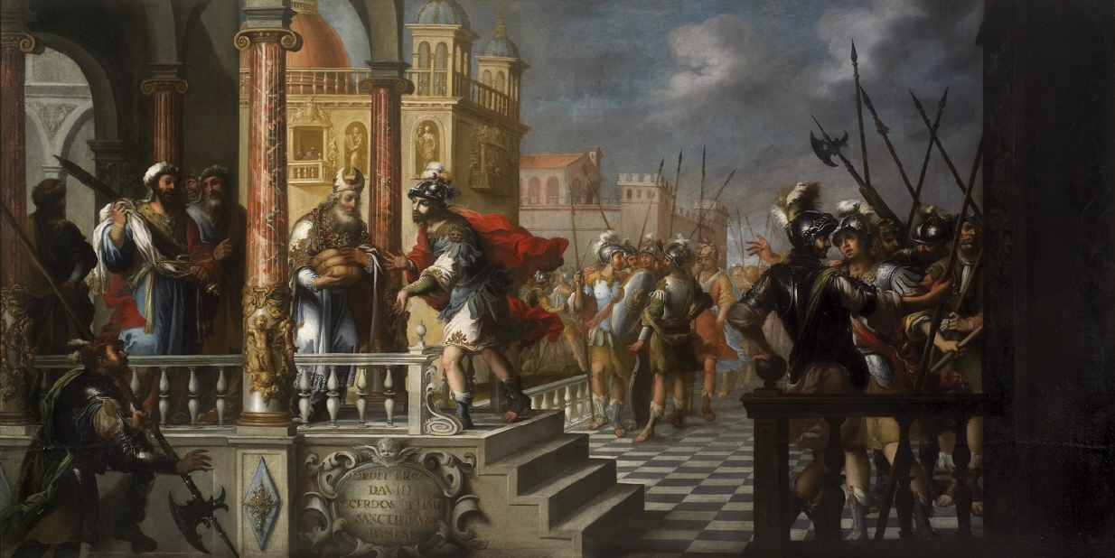 La obra muestra al futuro rey David en presencia del sacerdote Ajimelec.